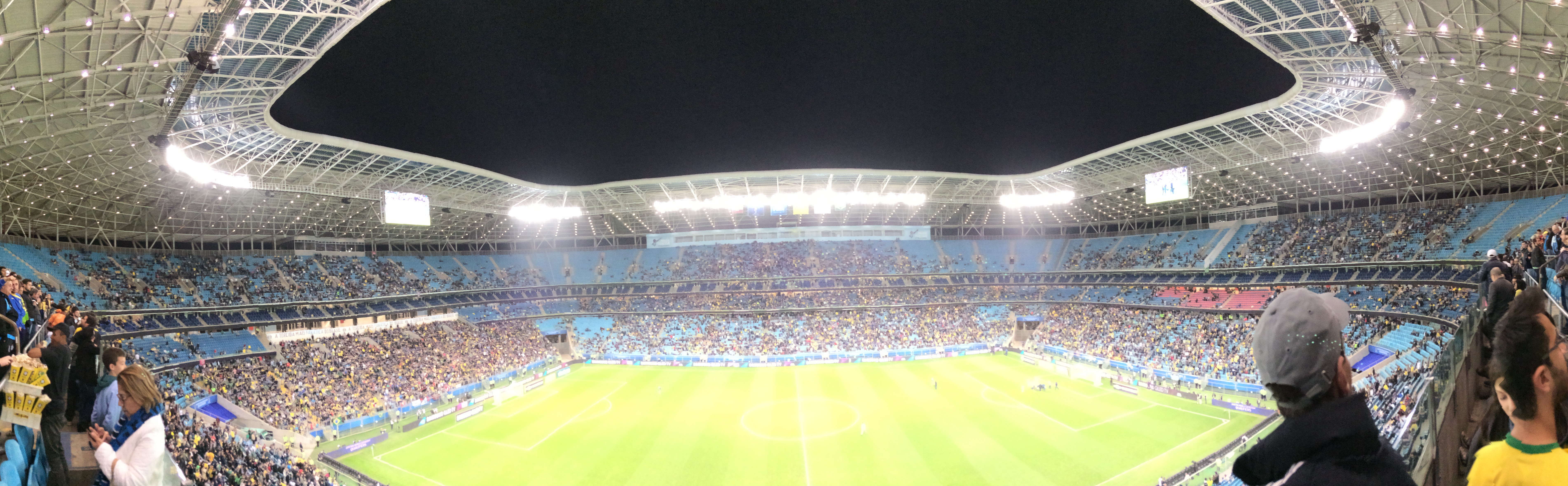 Panorama da Arena do Grêmio durante jogo entre Brasil e Equador.